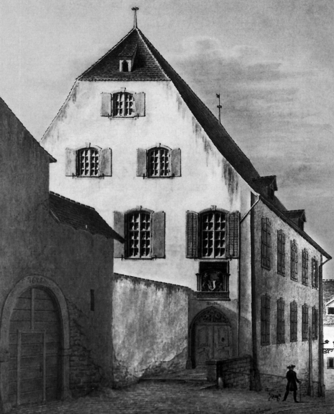 Haus zur Mücke in Basel. Baulicher Zustand zwischen 1769 und 1862. Aquarell von Johann Jakob Neustück (1799-1867).